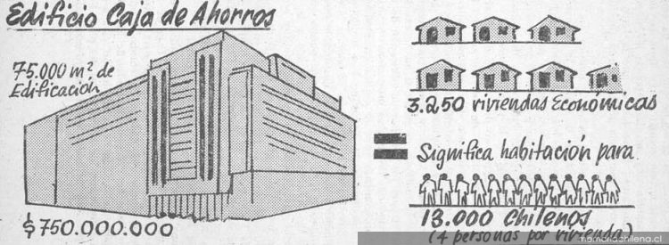 Panfleto de la Falange Nacional criticando el costo del Edificio de la Caja de Ahorro (actual Banco del Estado), equivalente a 3.250 viviendas económicas. Aparecido originalmente en: Un plan de vivienda popular / Falange Nacional. Santiago : Del Pacífico, 1952? 36 p.